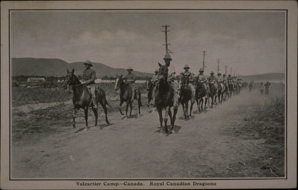 Valcartier Camp-Canada. Royal Canadian Dragons, carte postale, Valentine Series